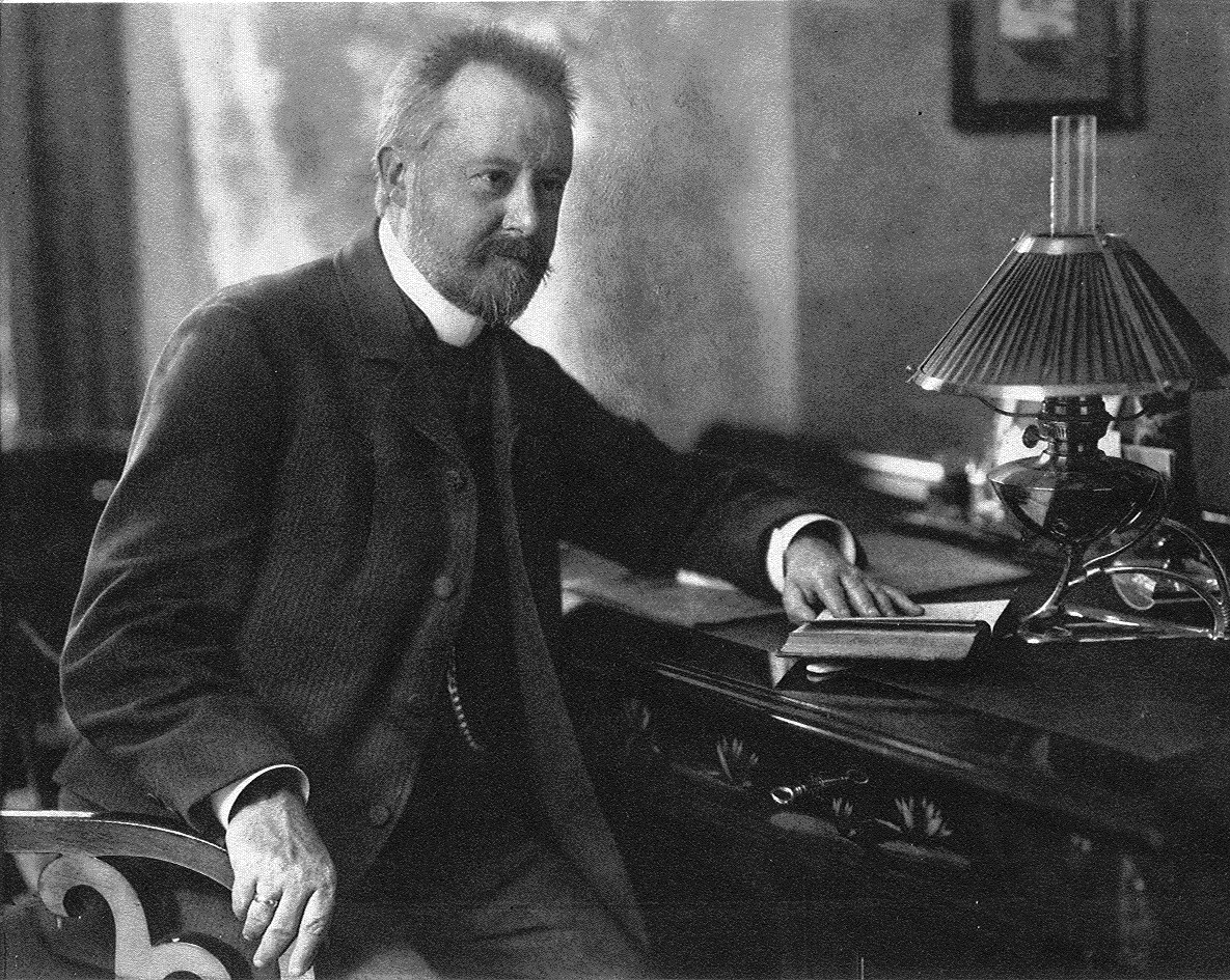 Gustav Falke, deutscher Schriftsteller